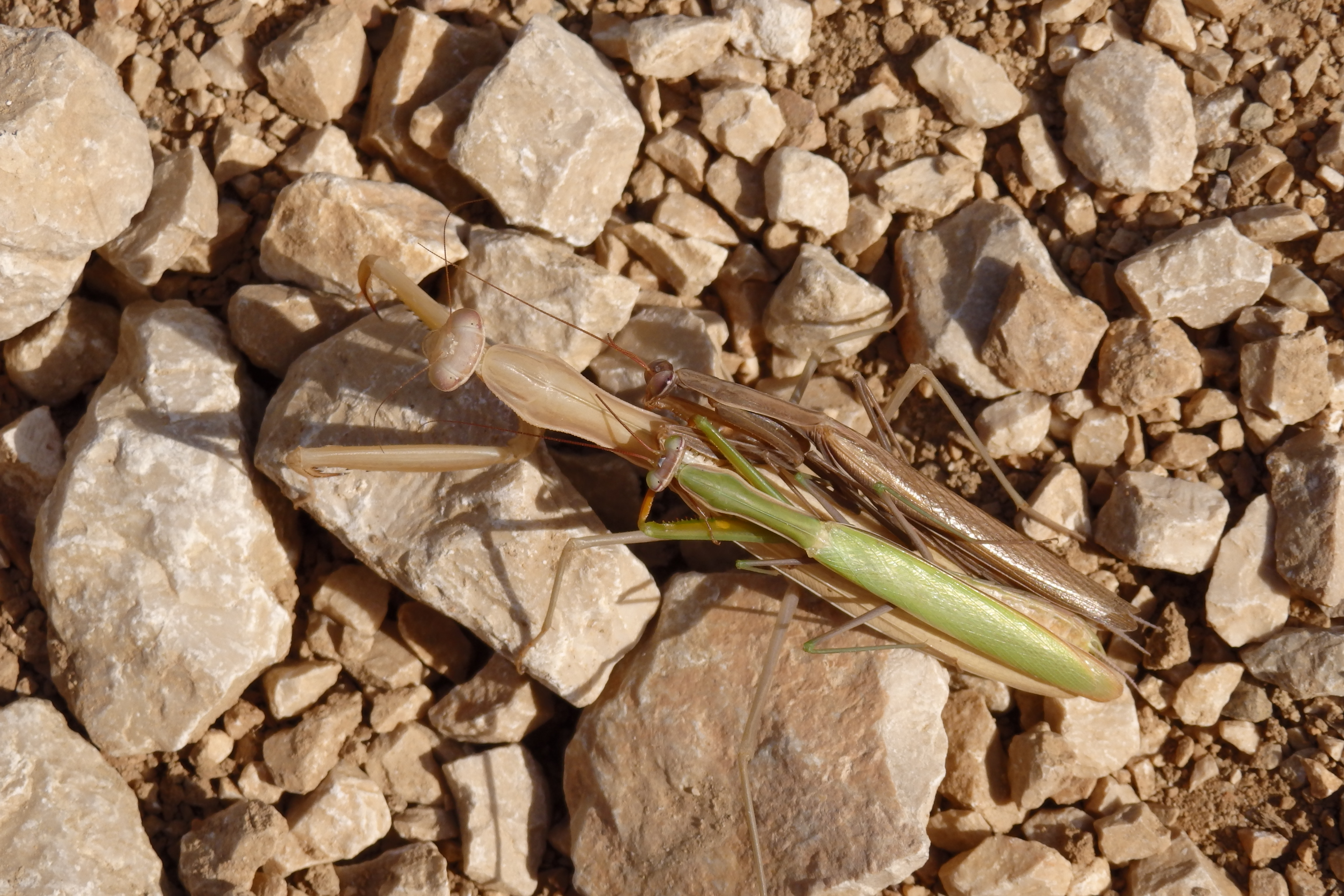 hmyz jižní Evropy-kudlanka nábožná